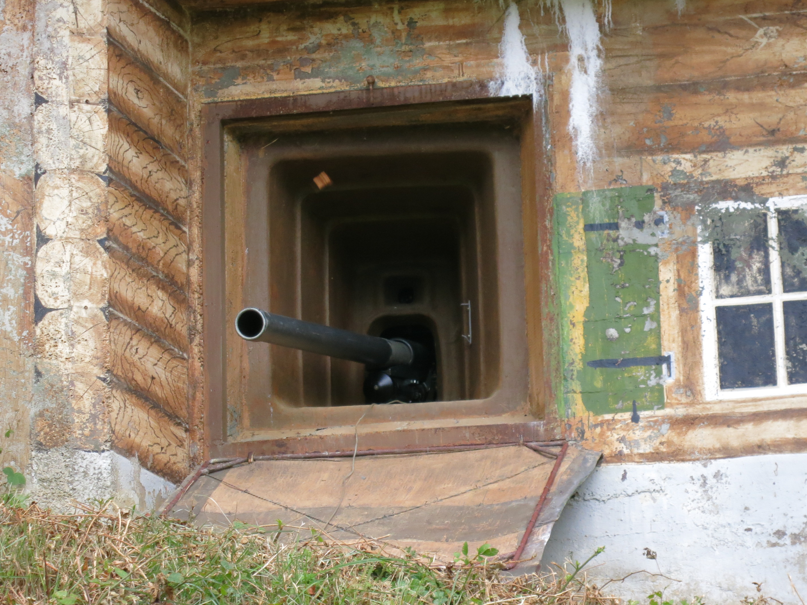 Sperrstelle Challhöchi, Hauenstein-Ifenthal SO, Schweiz